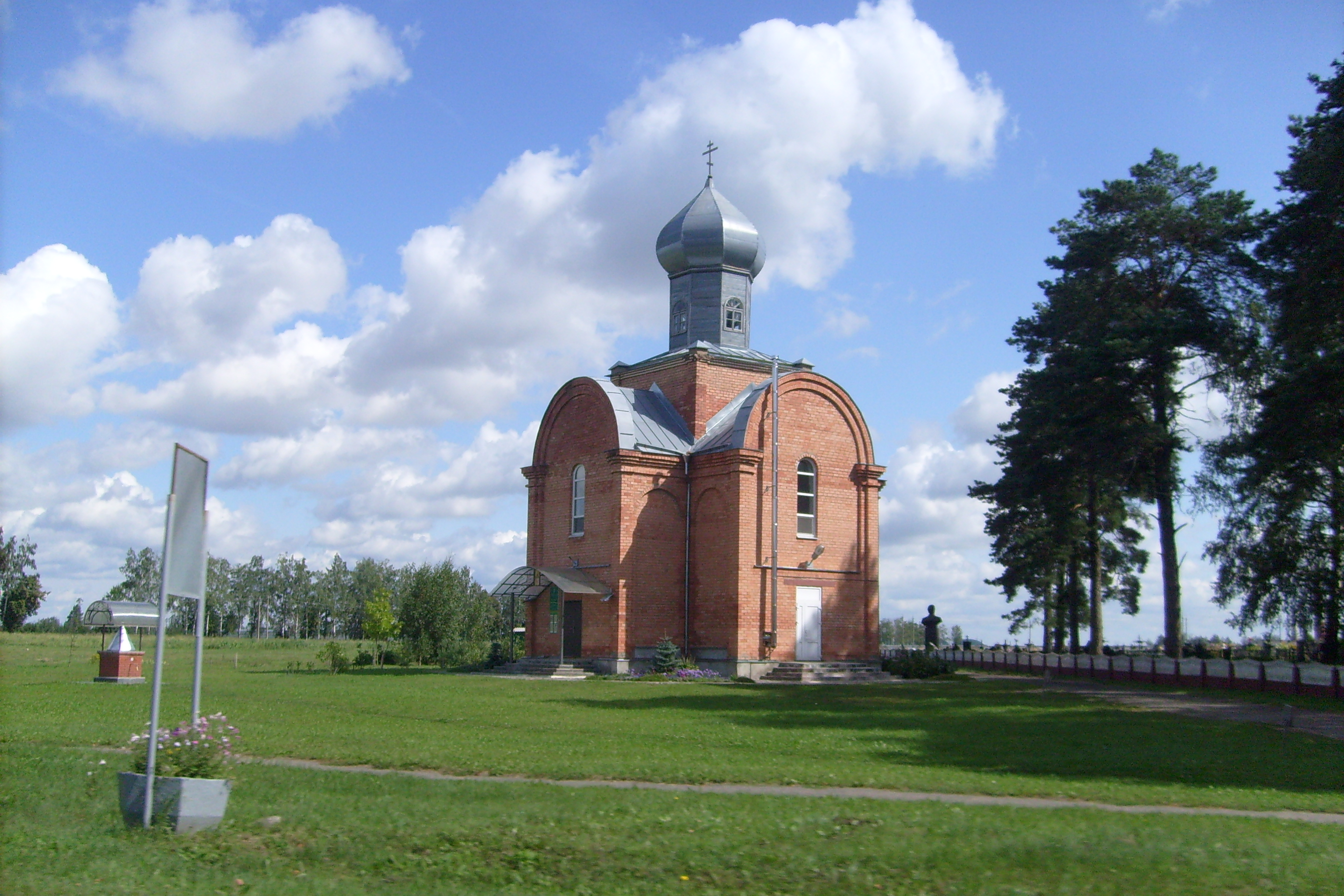 Троицкая церковь. Деревня Мышковичи (Кировский район, Могилёвская область)